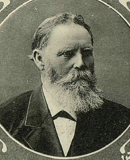 Зиновий Данилович Захаров - депутат Государственной Думы Российской империи третьего созыва, основатель религиозного движения молокан-захаровев